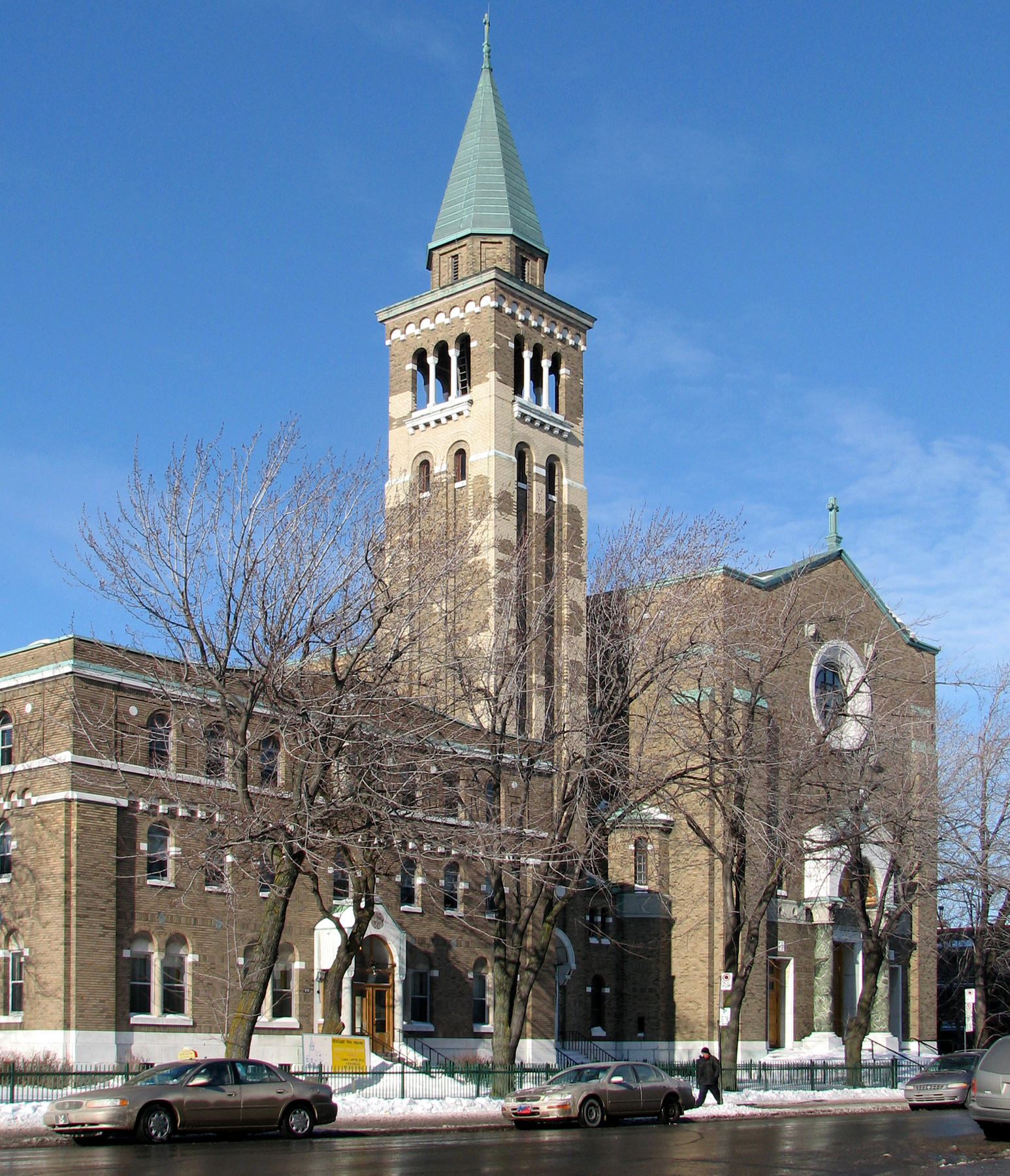 Église St-Ambroise dans le quartier Petite-Patrie à Montréal